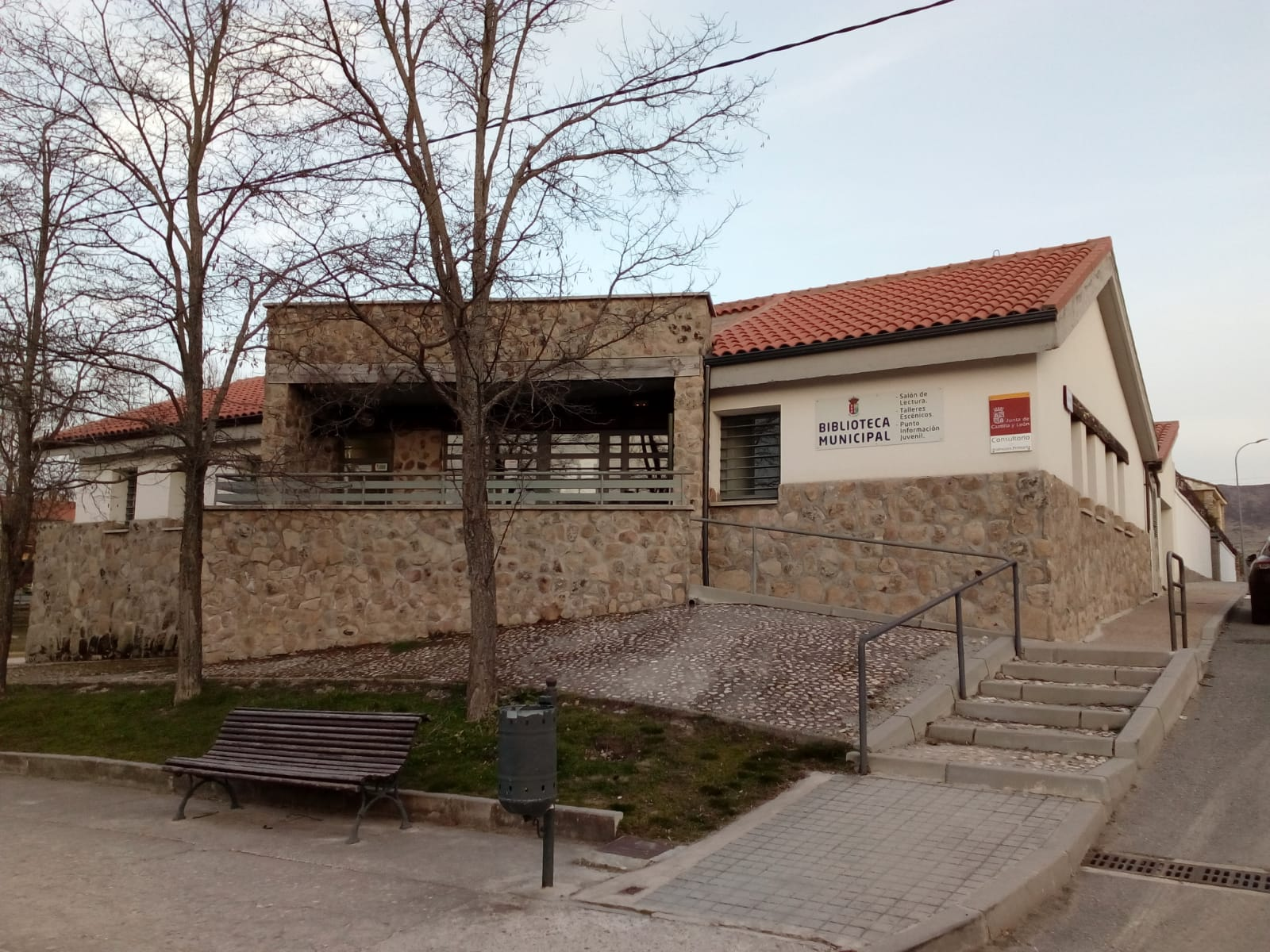 La biblioteca y el consultorio médico de Trescasas visto desde la carretera.